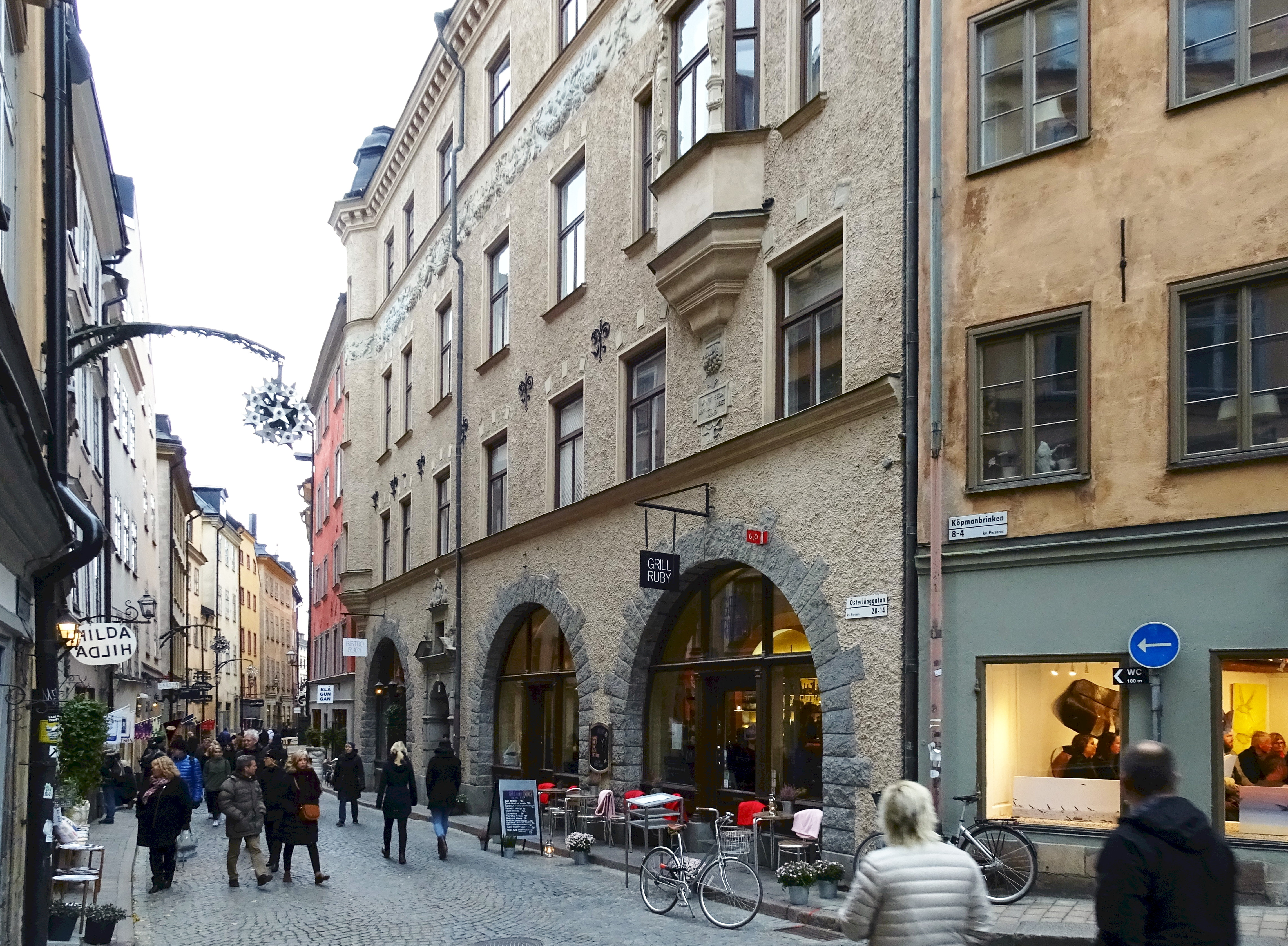 Fastigheten Perseus 8, Österlånggatan 14, arkitekt Isak Gustaf Clason